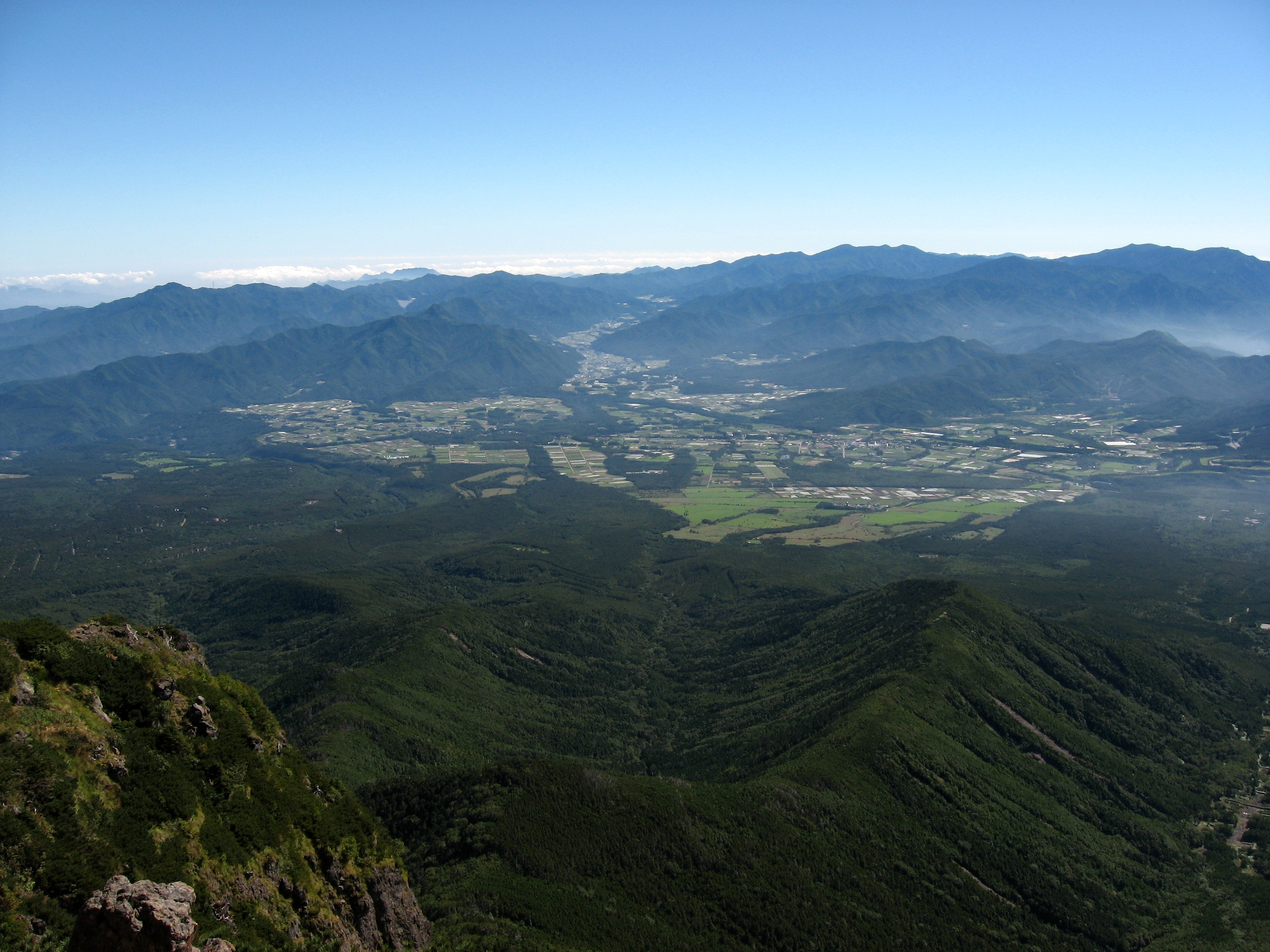 八ヶ岳から見た野辺山高原と秩父山地